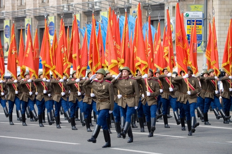 Парад перемоги, Київ.